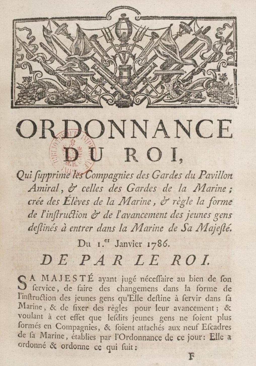 Première page de l'ordonnance royale du 1er janvier 1786 supprimant les gardes marines en vu de la réforme de la formation des officiers. Promulguée par le ministre de la Marine de Castries.